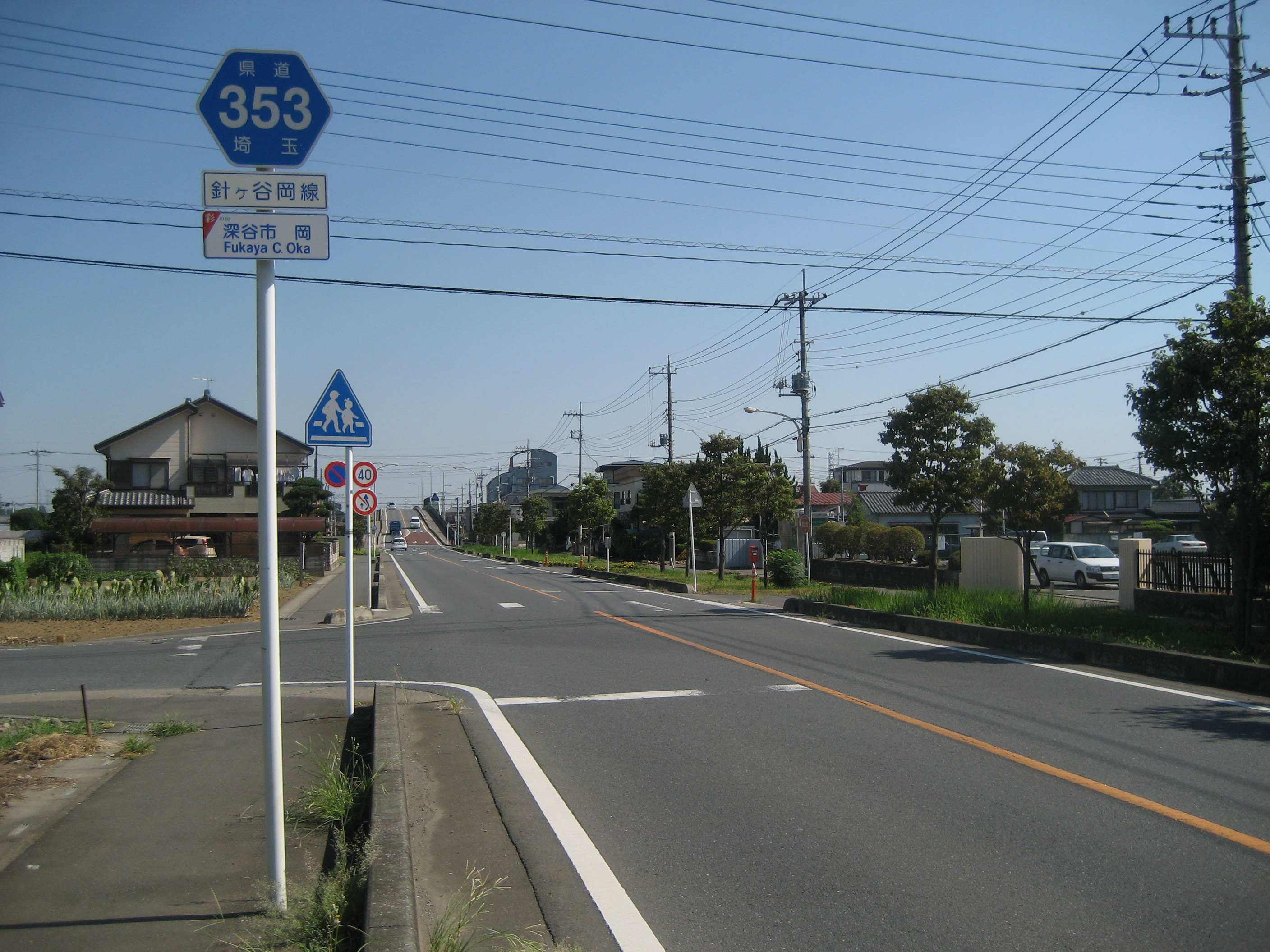 埼玉県道353号線深谷市岡 岡部総合支所付近